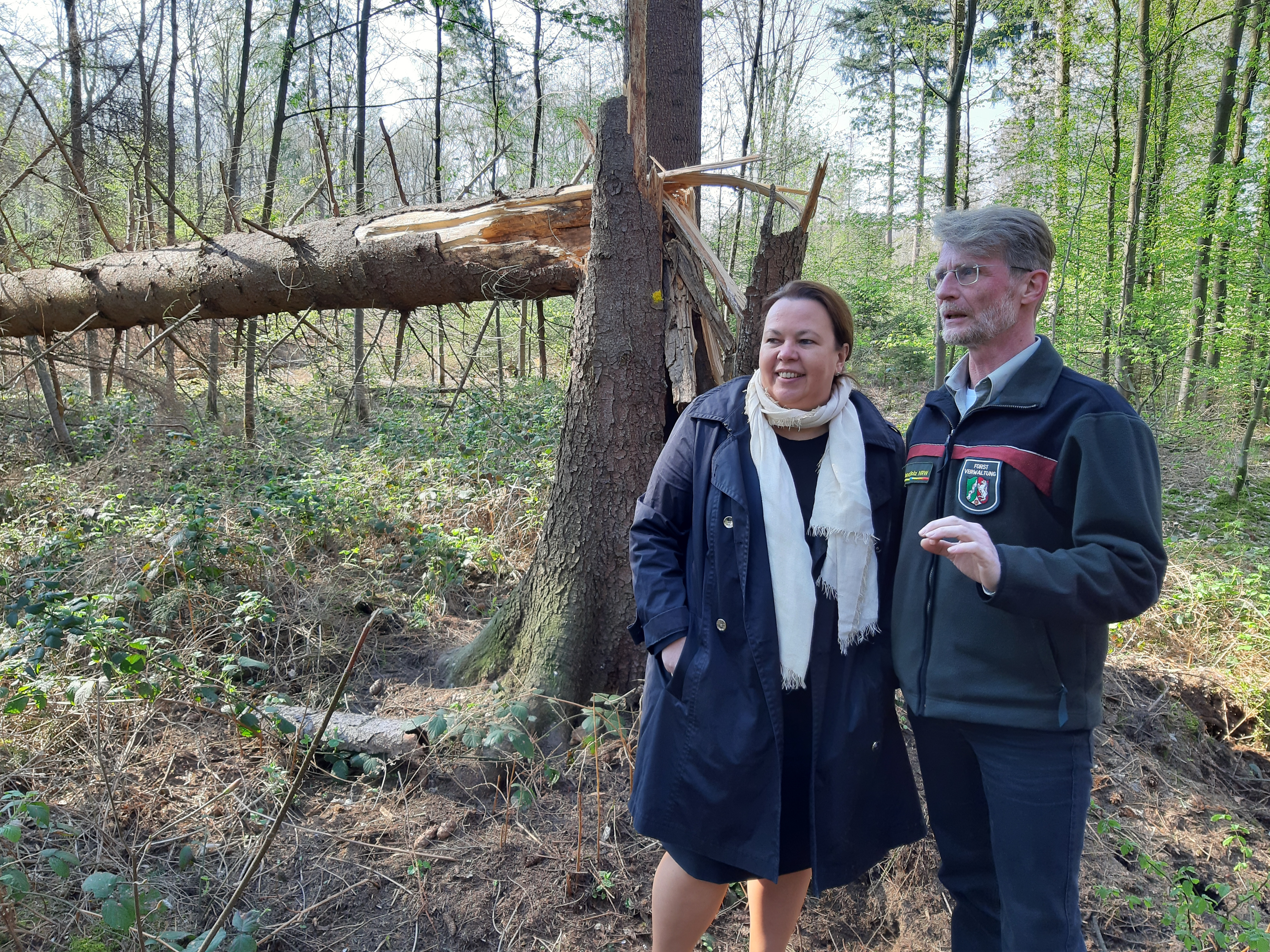 Ursula Heinen-Esser (Ministerin für Umwelt, Landwirtschaft, Natur- und Verbraucherschutz NRW) und Andreas Wiebe (Leiter des Landesbetriebs Wald und Holz NRW) im Forstrevier Knechtsteden